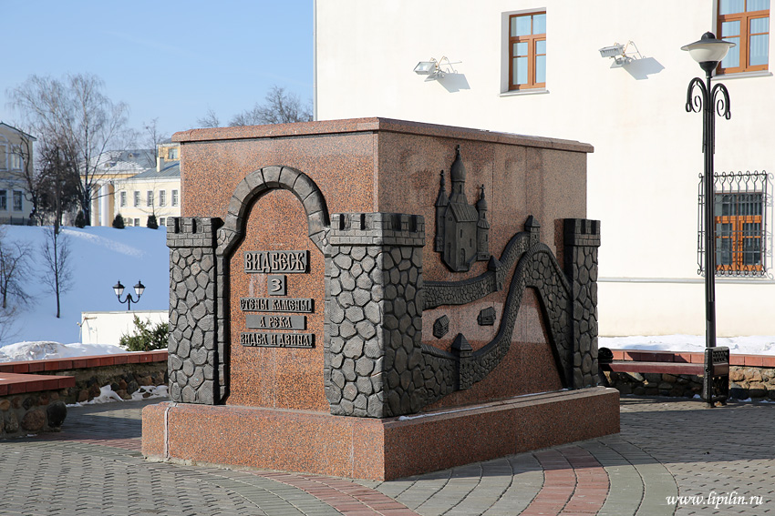 Віцебск.